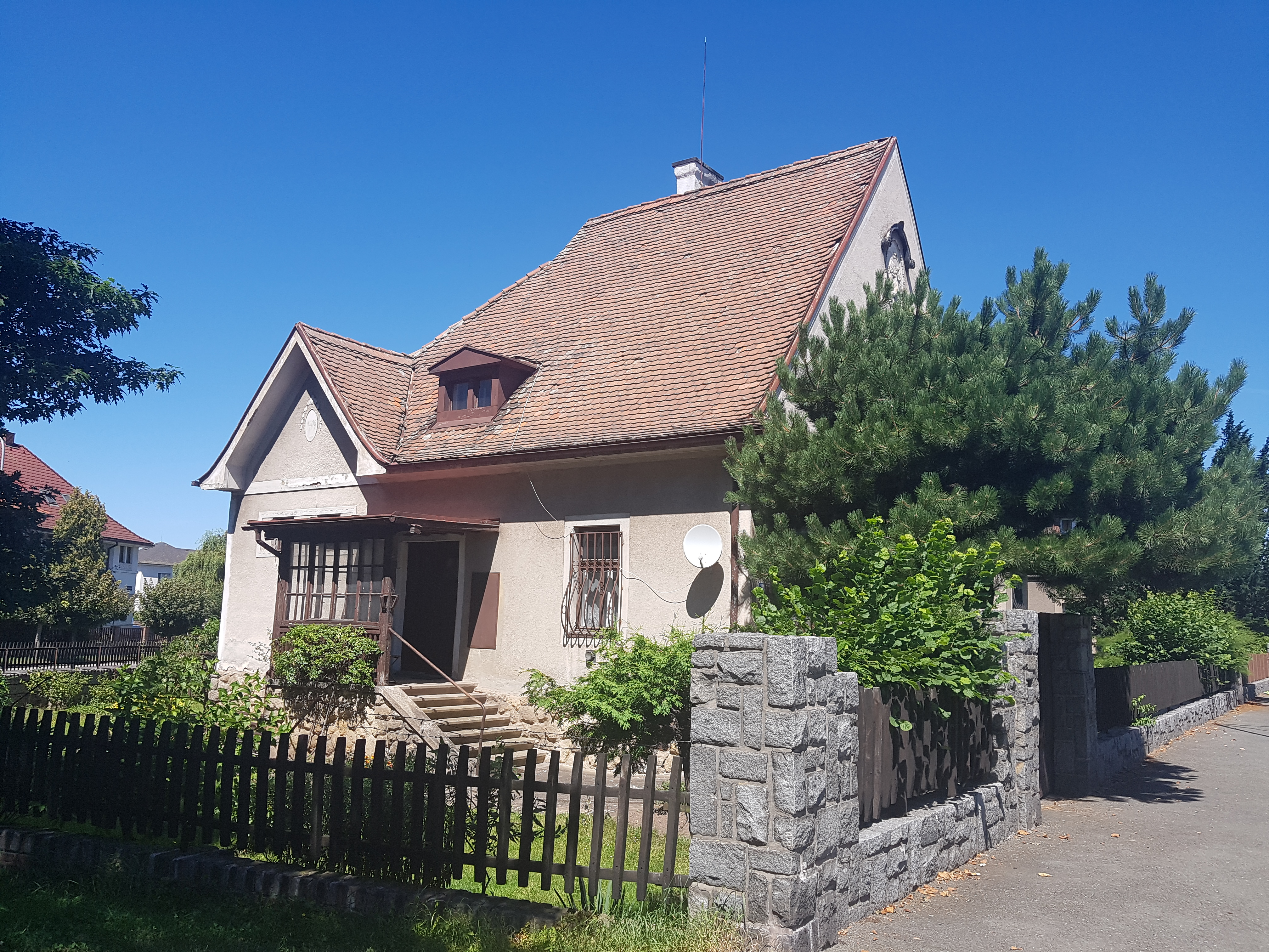 Vila Marie Šanderové v Hradci Králové v červenci 2020